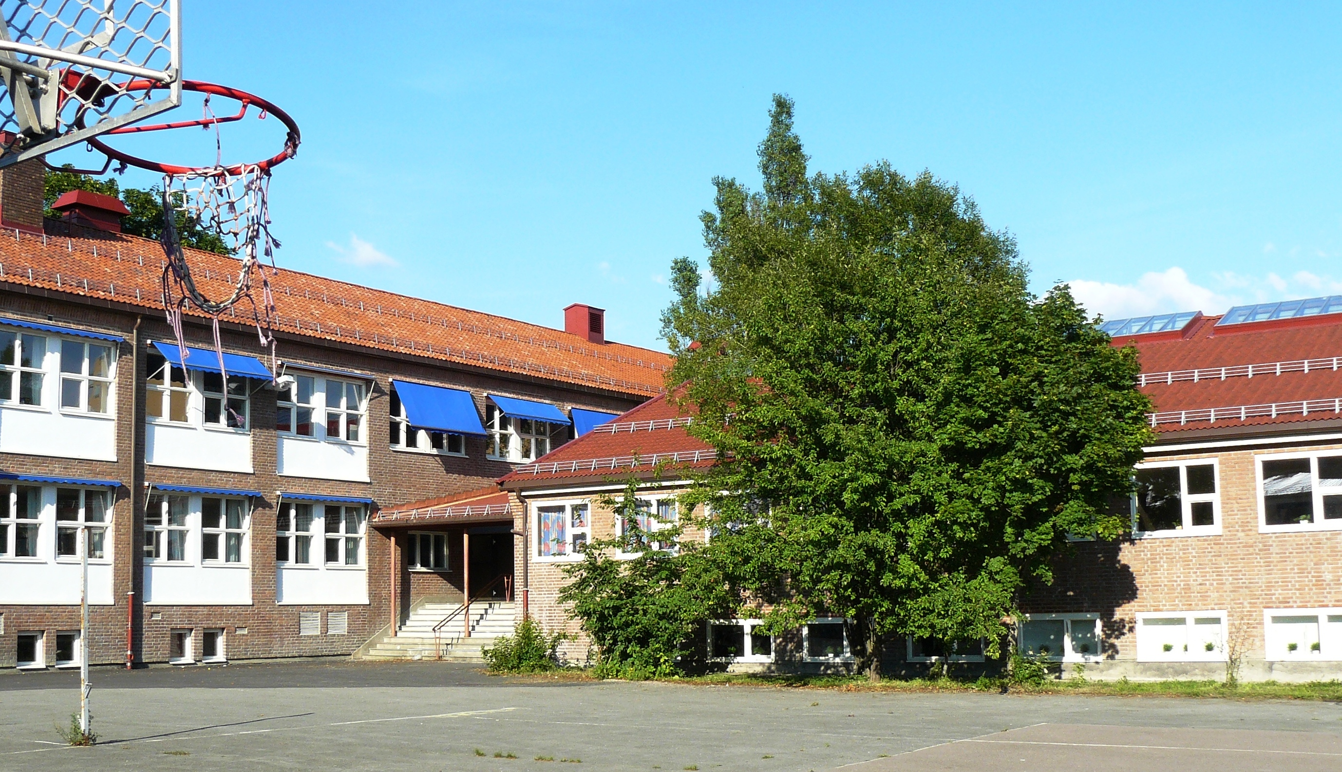 Årvoll school, Oslo